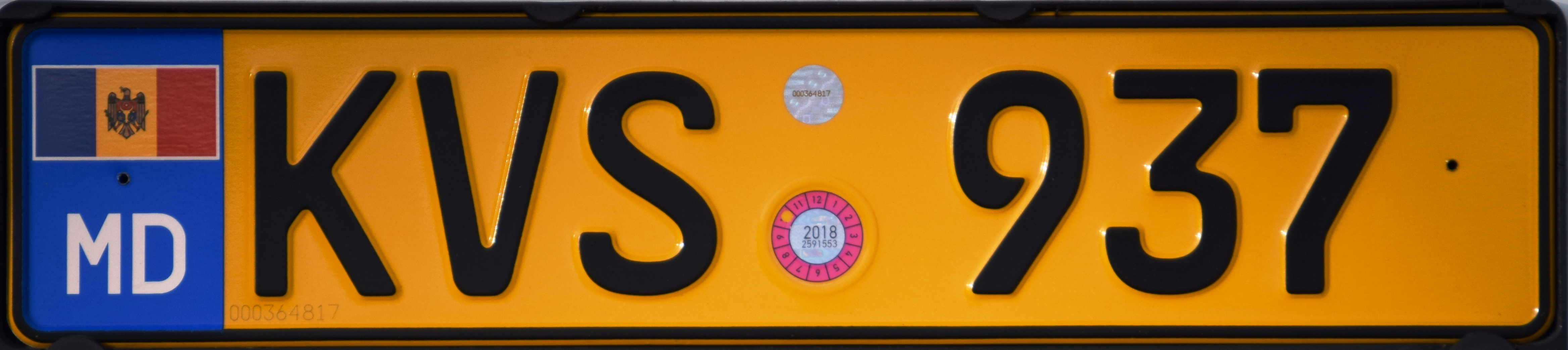 kentekenplaat Moldavië voor de bus en taxi